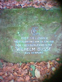 Gedenkstein zur Emordung von Bürgermeister Wilhelm Busse am 29. Juni 1921 im Heidelberger Stadtwald